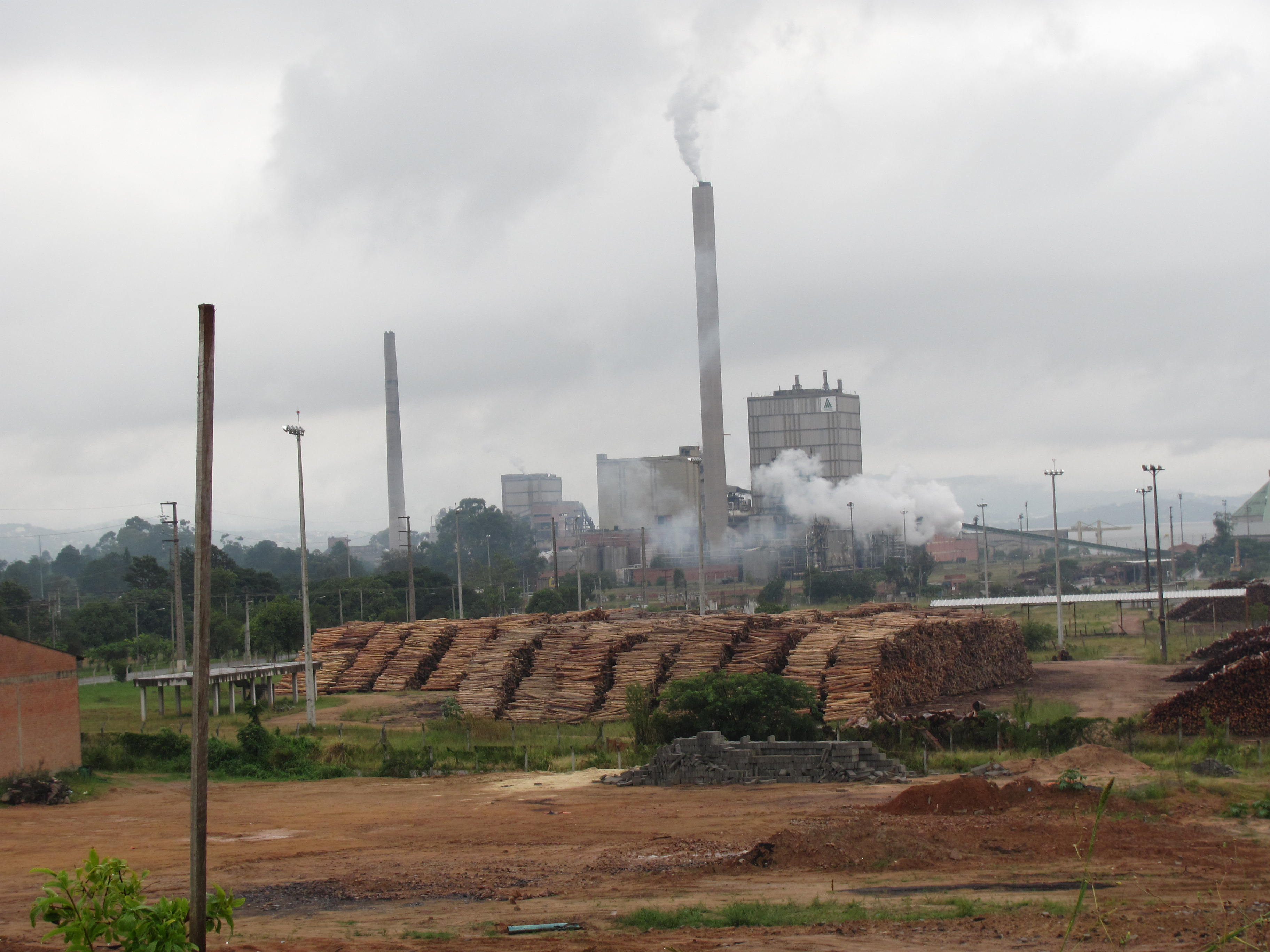 Fábrica de Celulose em Guaíba. Atualmente se chama Celulose Riograndense mas, já teve os nomes de Borregaard, Riocel e Aracruz